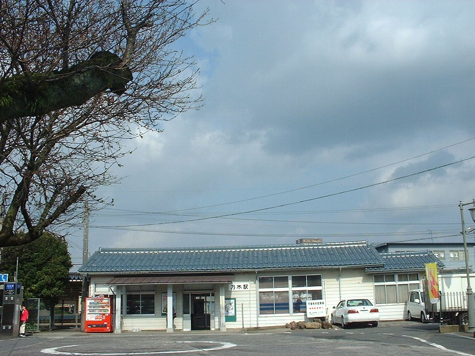 乃木駅 駅舎